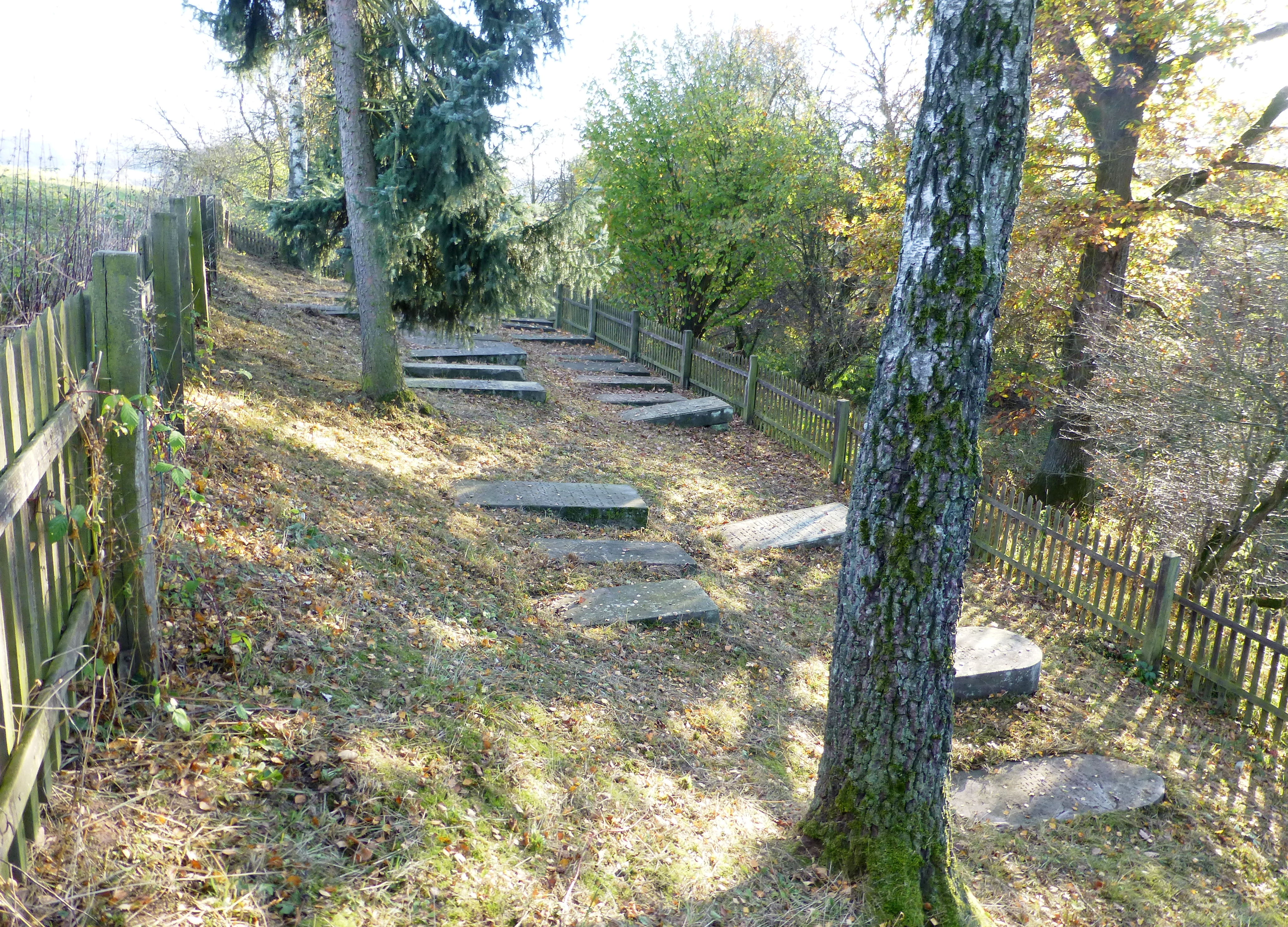 Blick auf den jüdischen Friedhof bei Dankelshausen, Gemeinde Scheden, Südniedersachsen. Belegungszeit 1797 bis 1891, 28 erhaltene Grabsteine